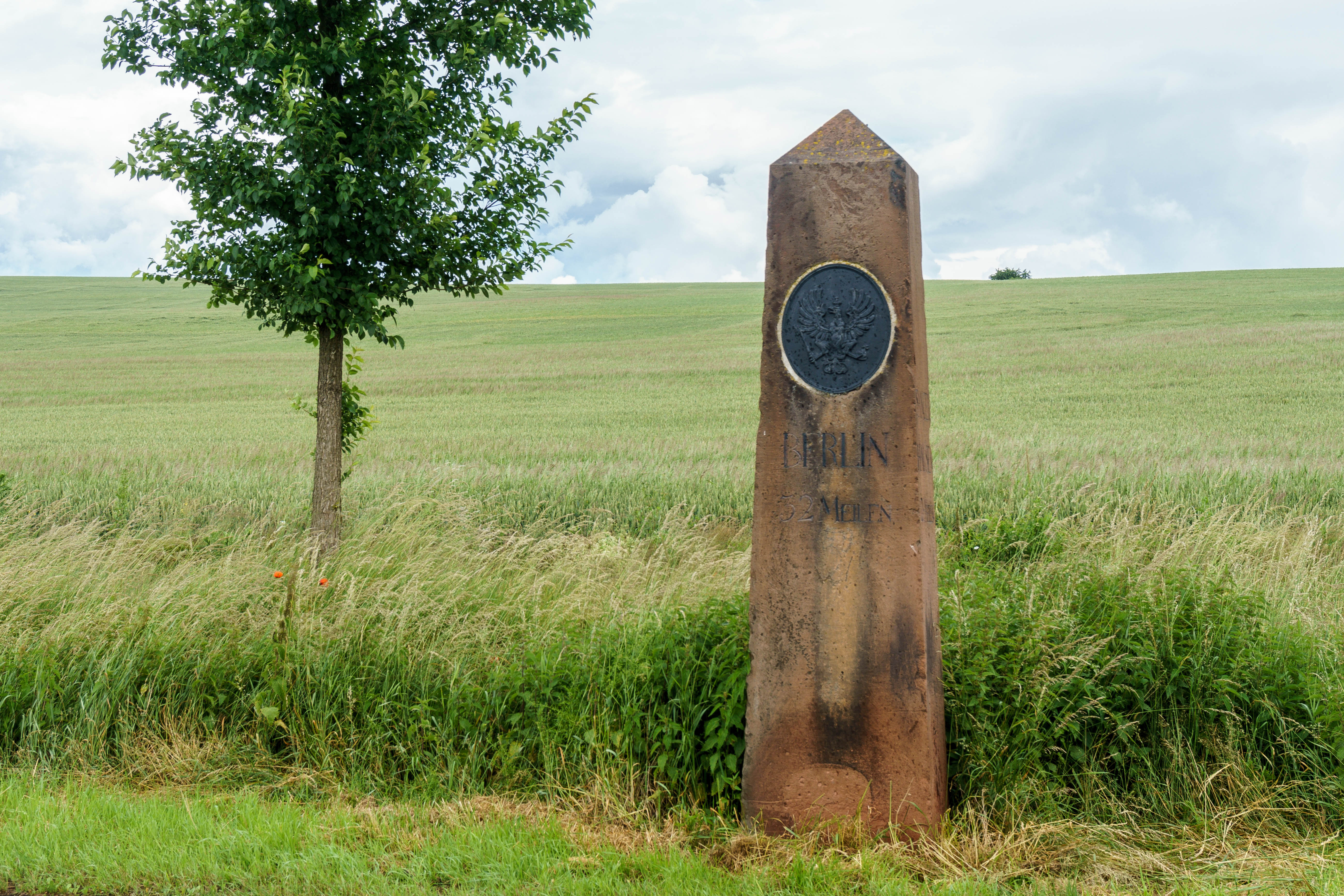 Preußischer Ganzmeilenobelisk an der L 151 zwischen Berga und Görsbach. Inschrift: BERLIN 32 MEILEN ; NORDHAUSEN 2 MEILEN ; SANGERHAUSEN 2 7/8 MEILE